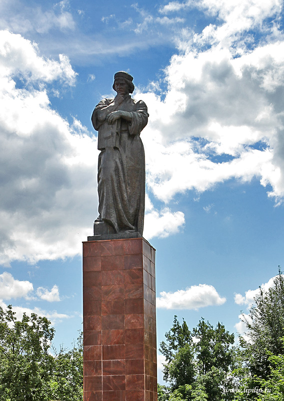 Полацк. Помнік Ф. Скарыне